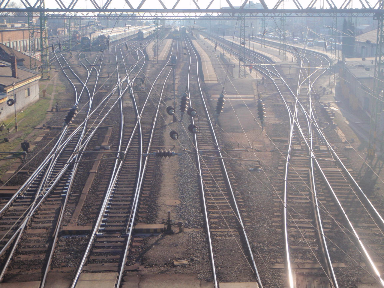 Bahnhof Szombathely